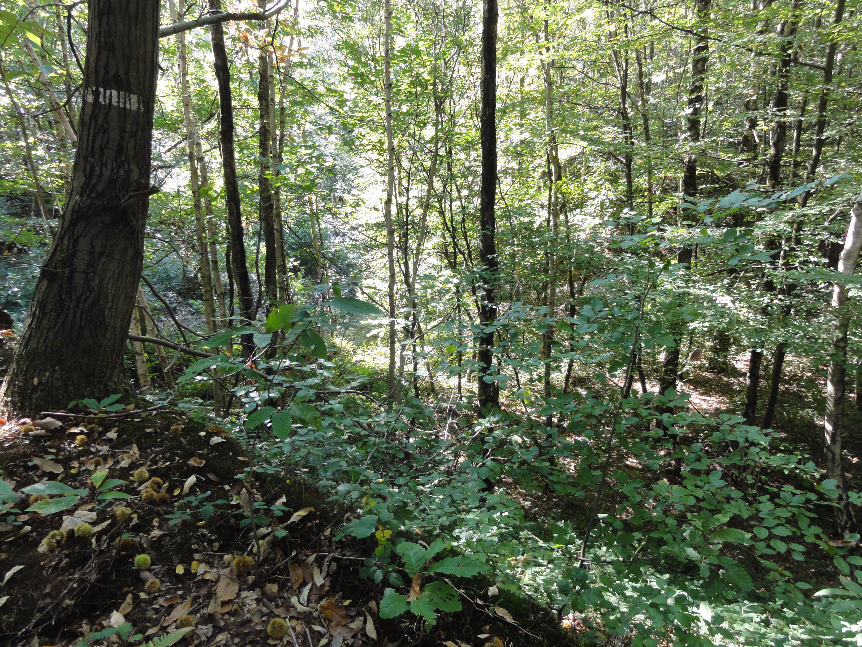 Terril n° 258 dit Sablière du Bois des Dames, disparu, usines de la Compagnie des mines de Bruay dans le bassin minier du Nord-Pas-de-Calais, Bruay-la-Buissière, Pas-de-Calais, Nord-Pas-de-Calais, France.